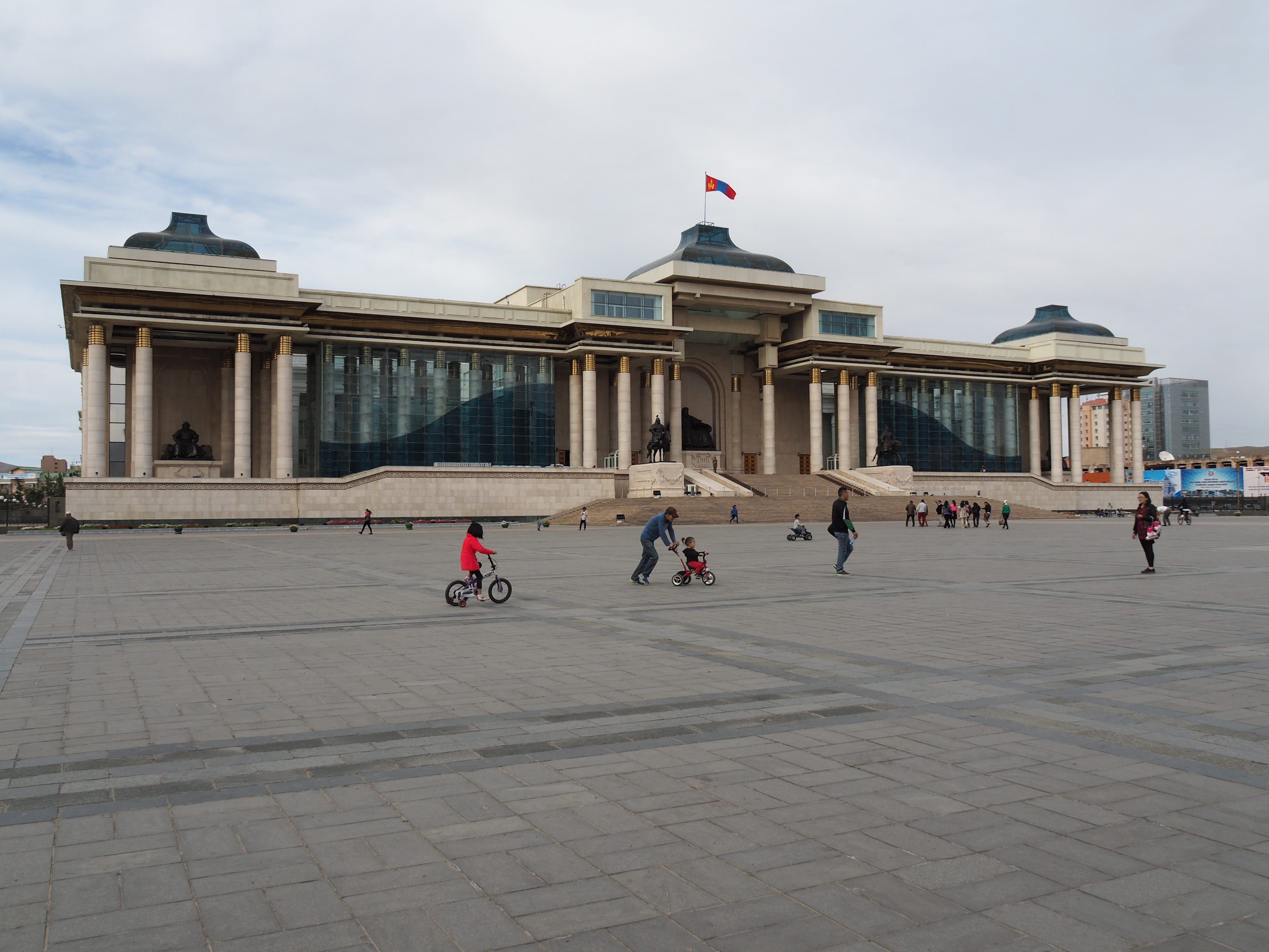 Ulaanbaatar